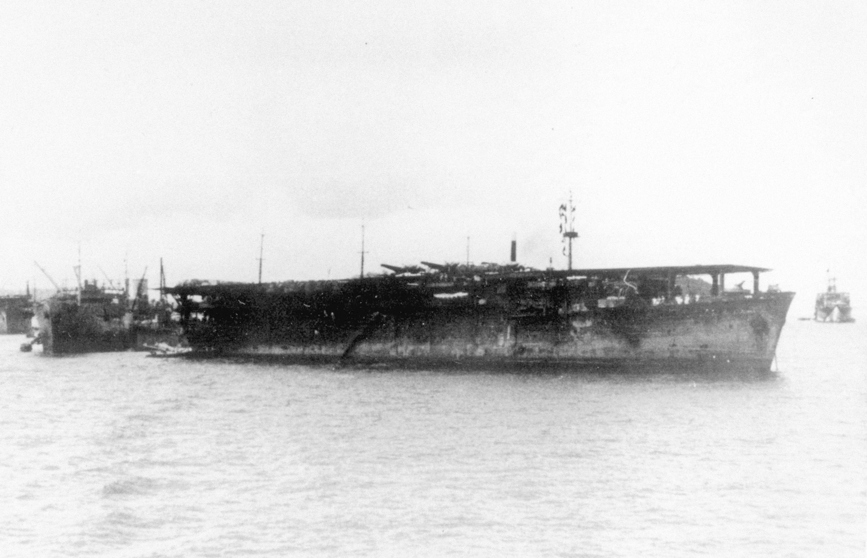 日本海軍航空母艦大鷹型「冲鷹」トラック島にて停泊中の写真。左奥で正面を向けて停泊しているのは同形艦雲鷹。(Chuyo at anchor in Truk)